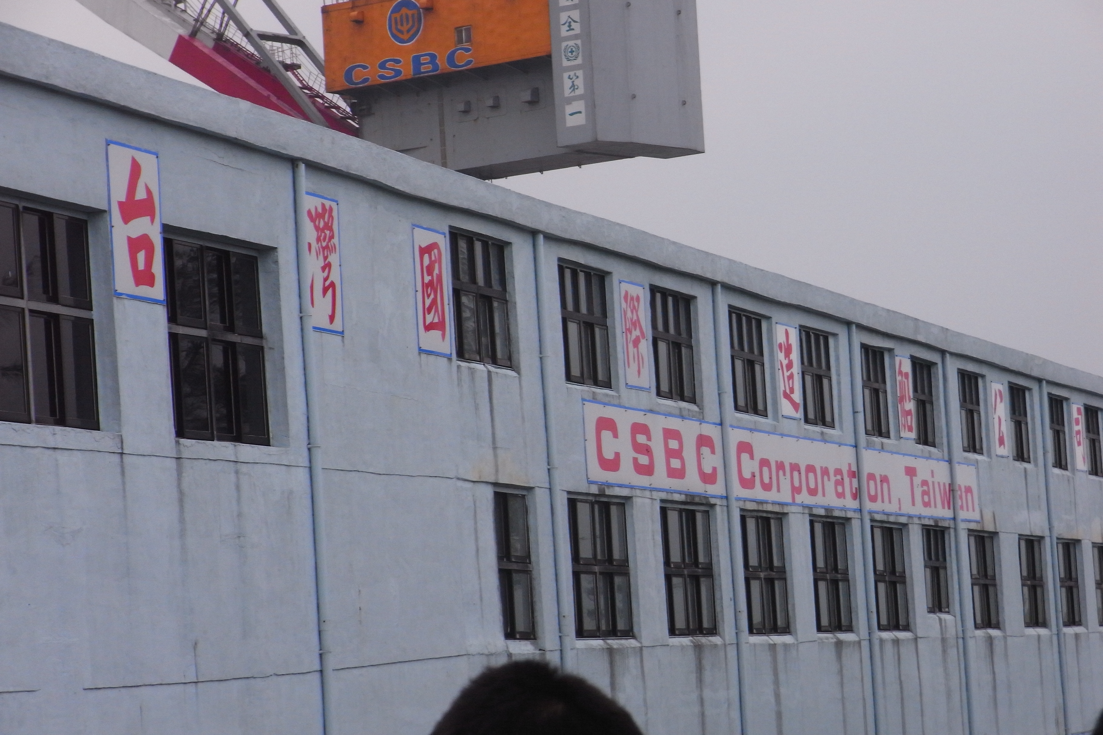 台灣國際造船基隆廠，地址：基隆市中正區和一路224號。